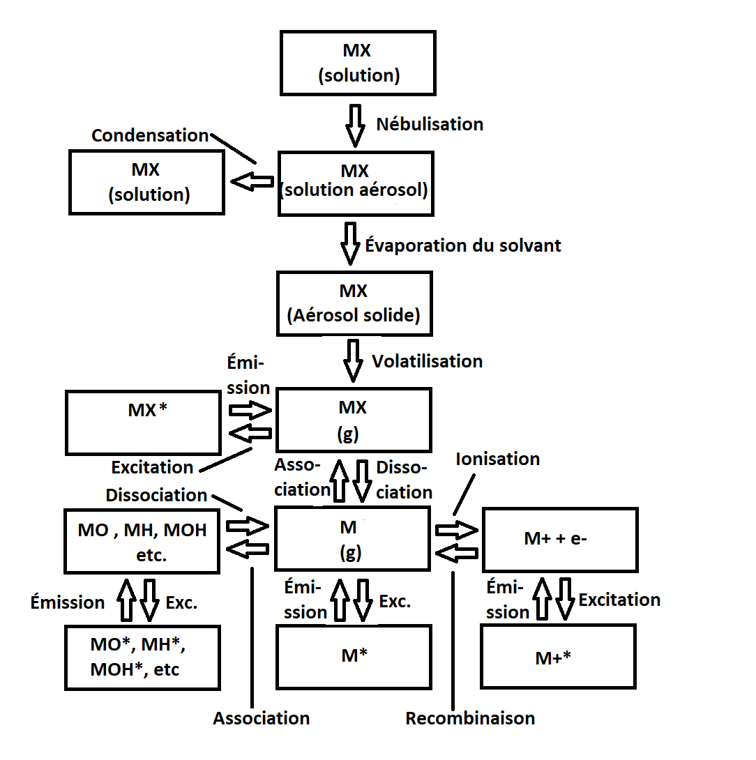 Principe d'atomisation et d'excitation d'un métal ionique et son contra-anion